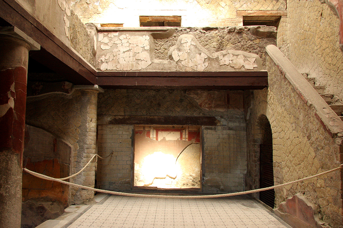 Casa del Patio Bonito, Herculano.